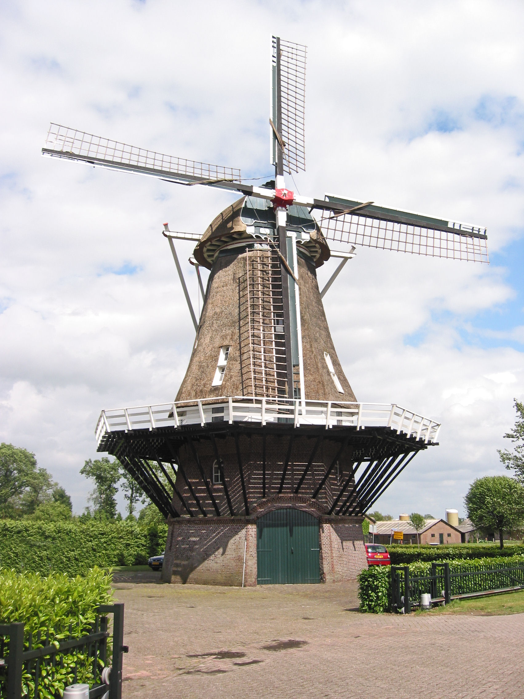 Walderveensemolen in Walderveen, Gelderland, the Netherlands